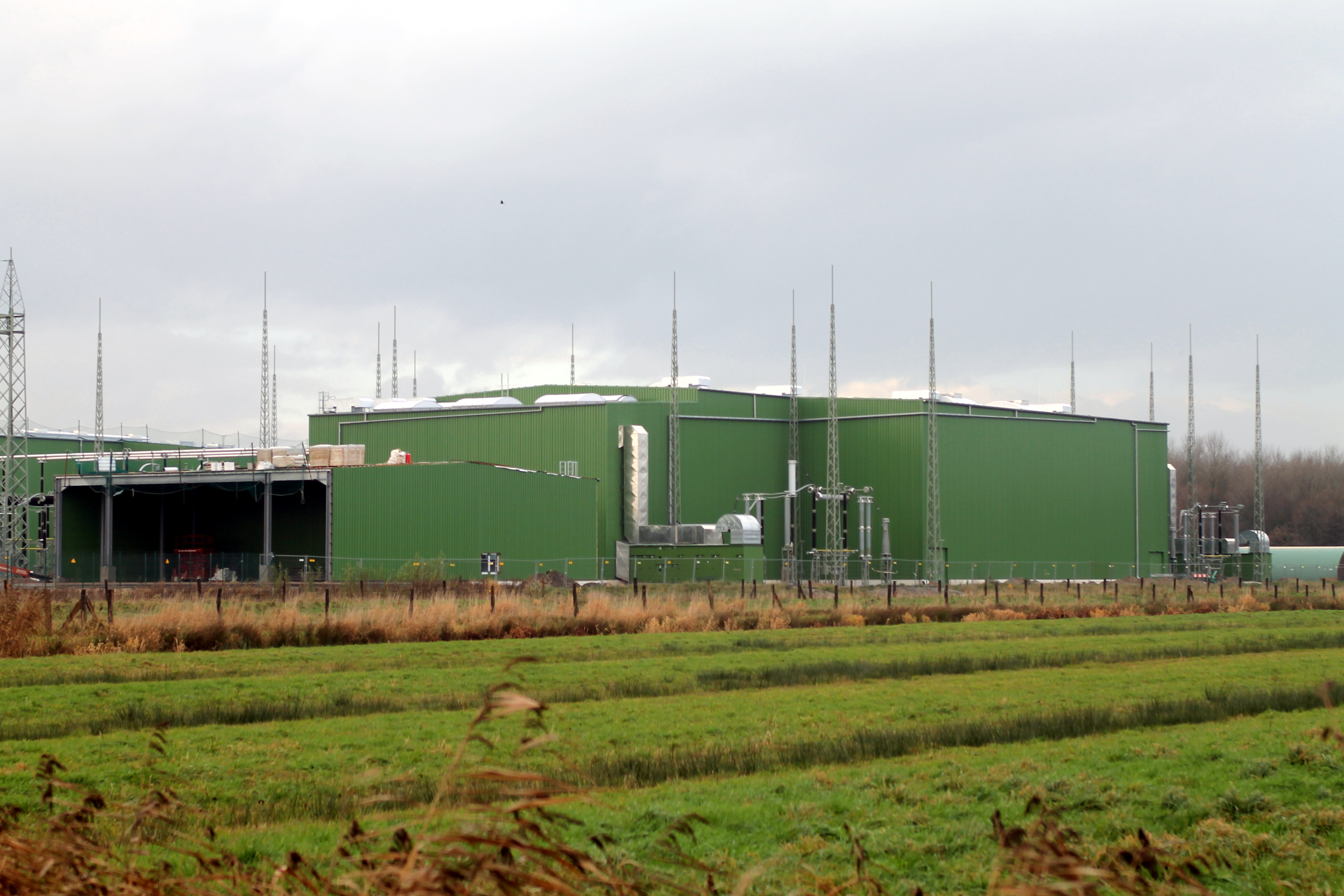 Stromrichterstation Büttel - OpenStreetMap(Info)